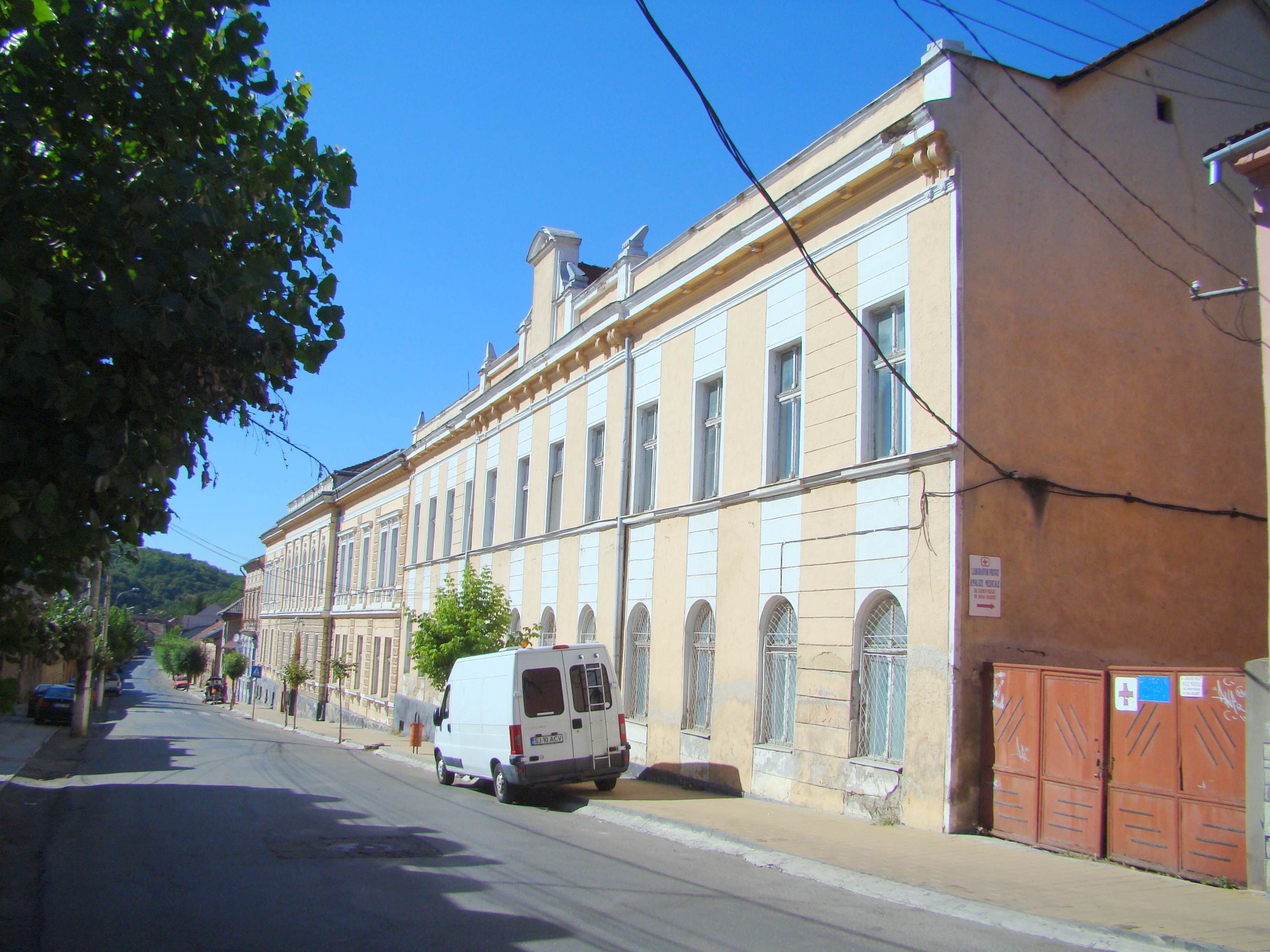 Centrul de cercetări și asistență medicală, oraș Șimleu Silvaniei, Str. 1 Decembrie 1918 37